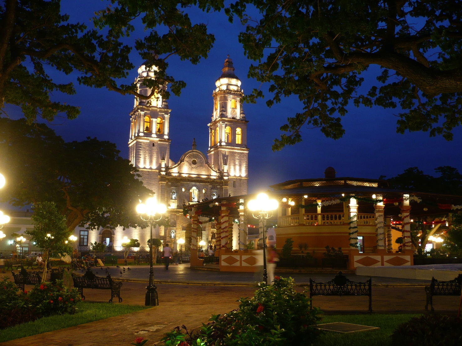 Plaza principal y Catedral de Campeche, Campeche